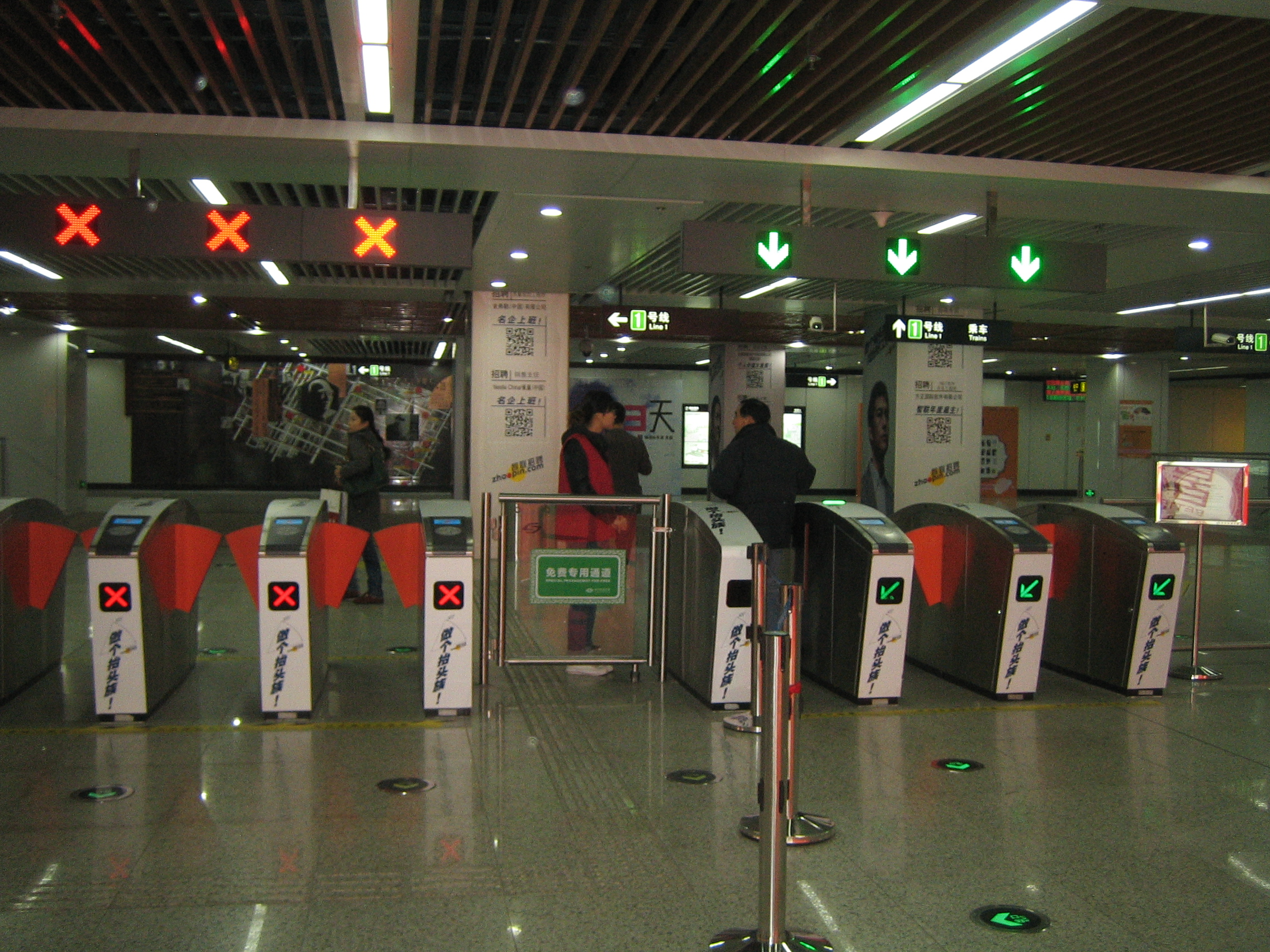 苏州轨道交通1号线乐桥站闸机